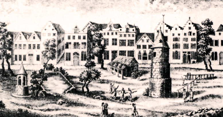 Historische Darstellung, Neumarkt, Köln im 16. Jh.